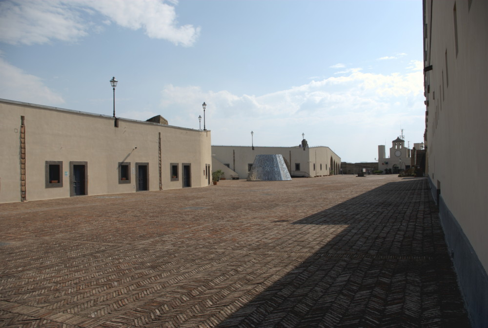 Piazza d'armi di Castel Sant'Elmo di Napoli